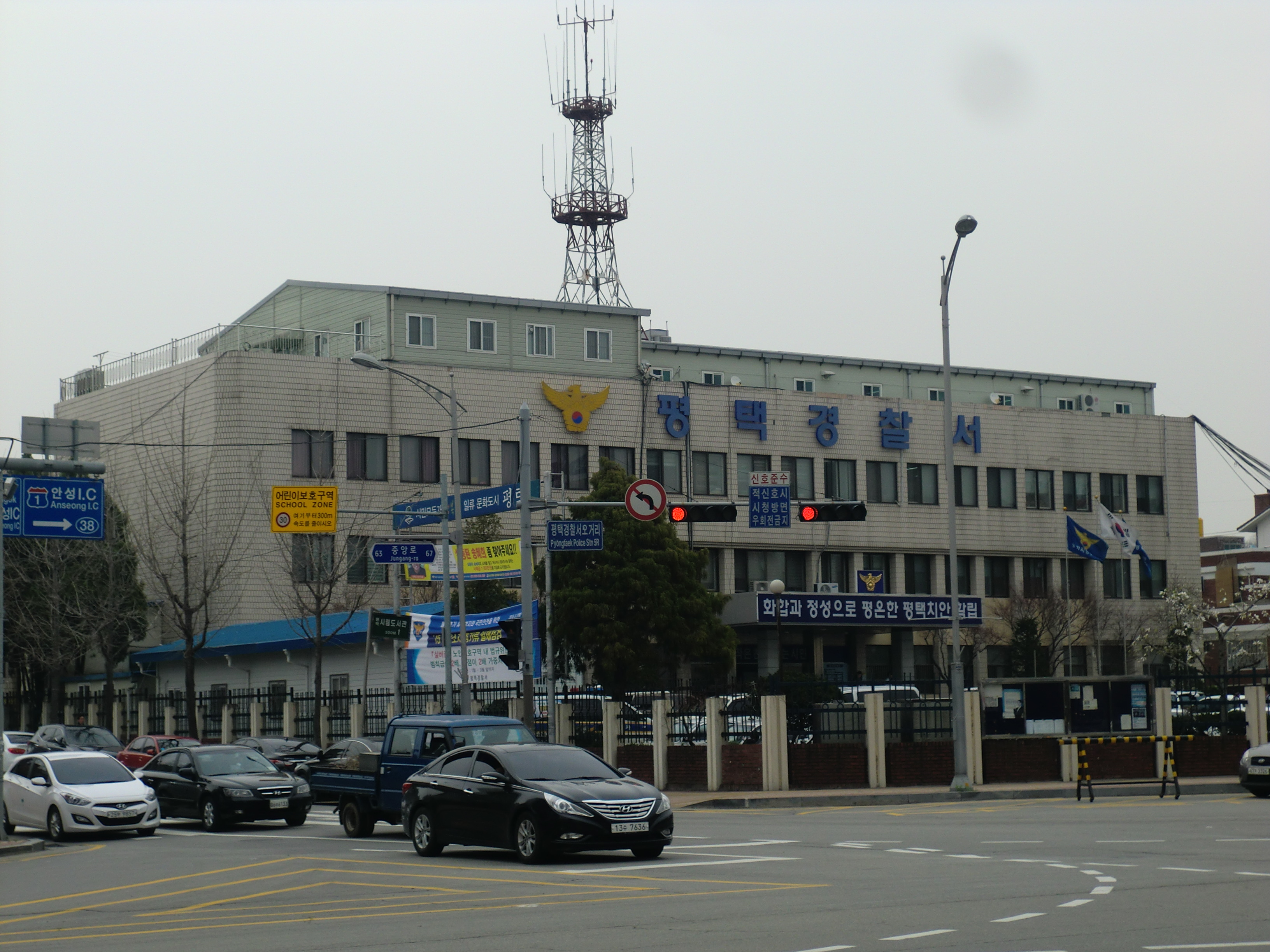 경기도 평택시에 있는 평택경찰서